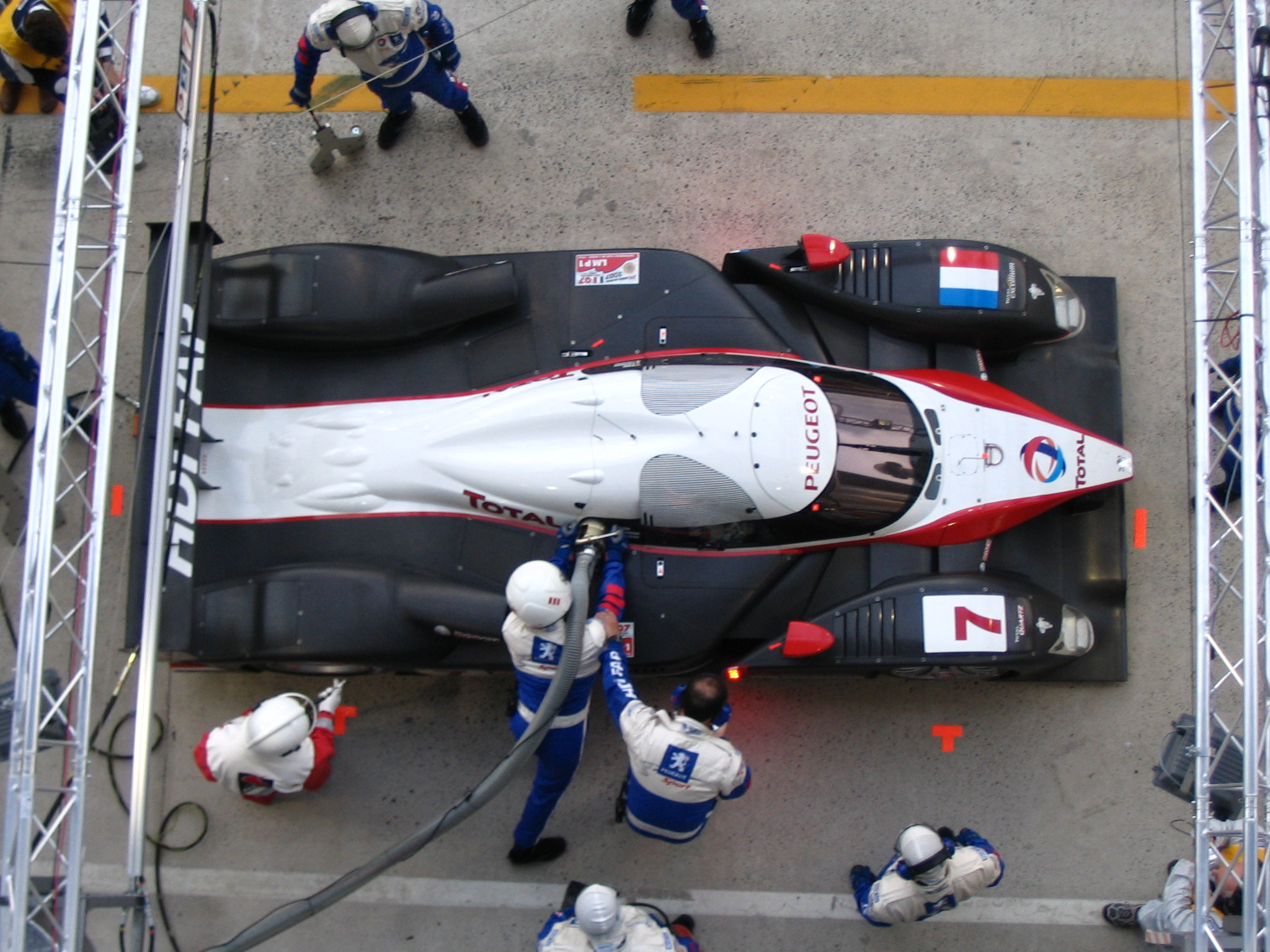 Peugeot 908 in un pit-stop a Le Mans 2007